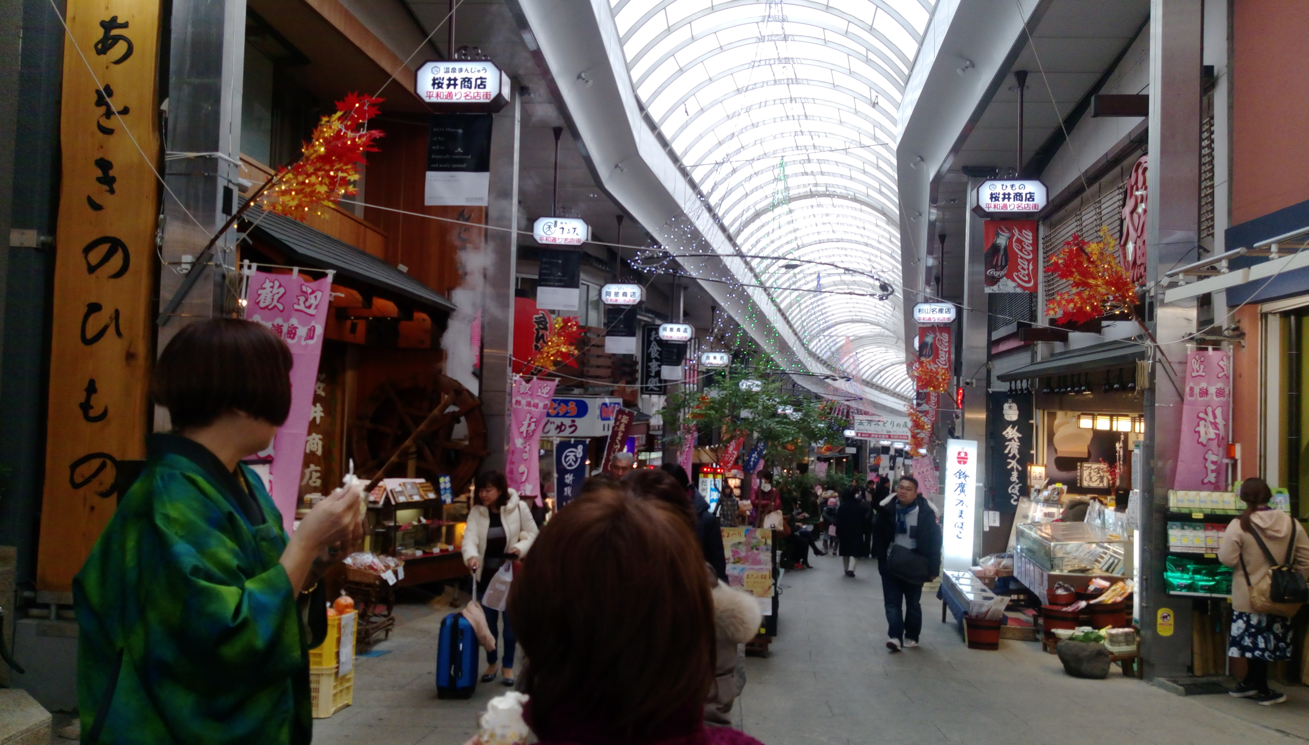 熱海車站附近商店街。